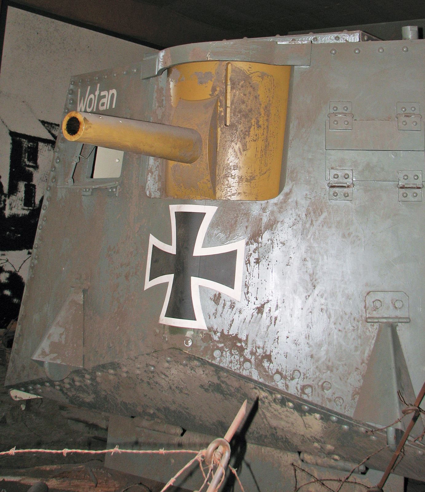 Dieses Bild zeigt den Nachbau des A7V "Wotan".